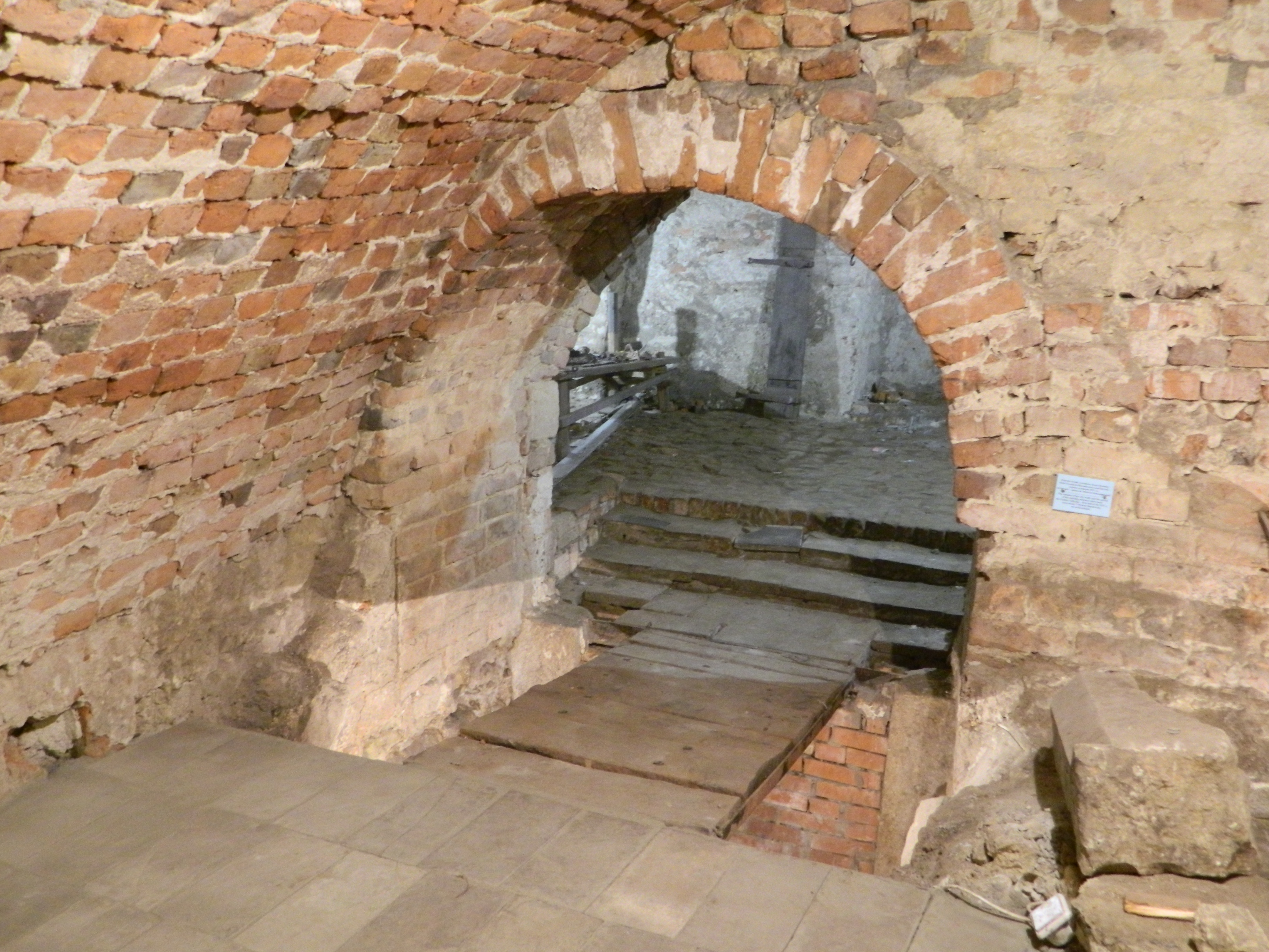 Подвал костёла